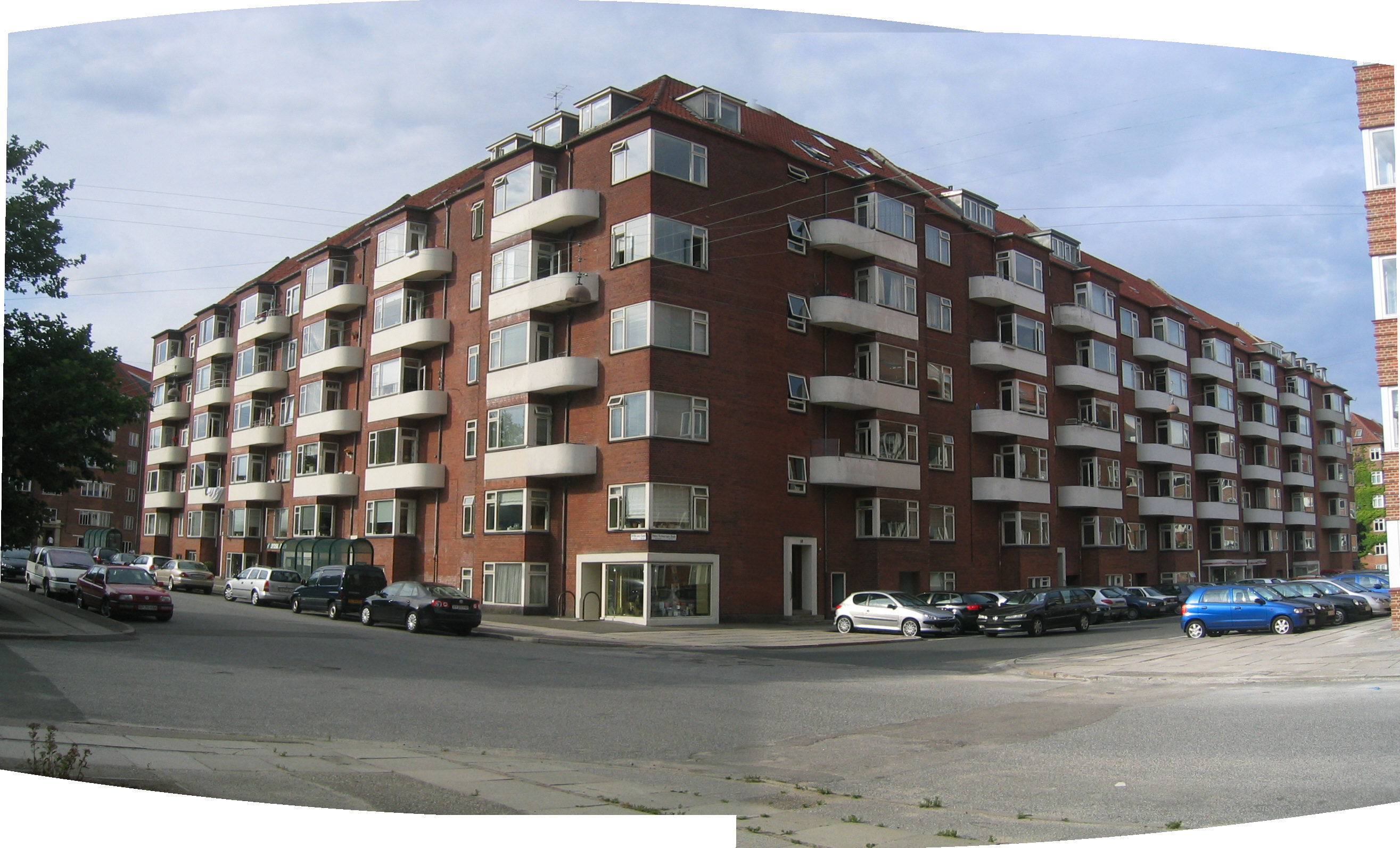 Hans Schourups Gade, Århus, Denmark